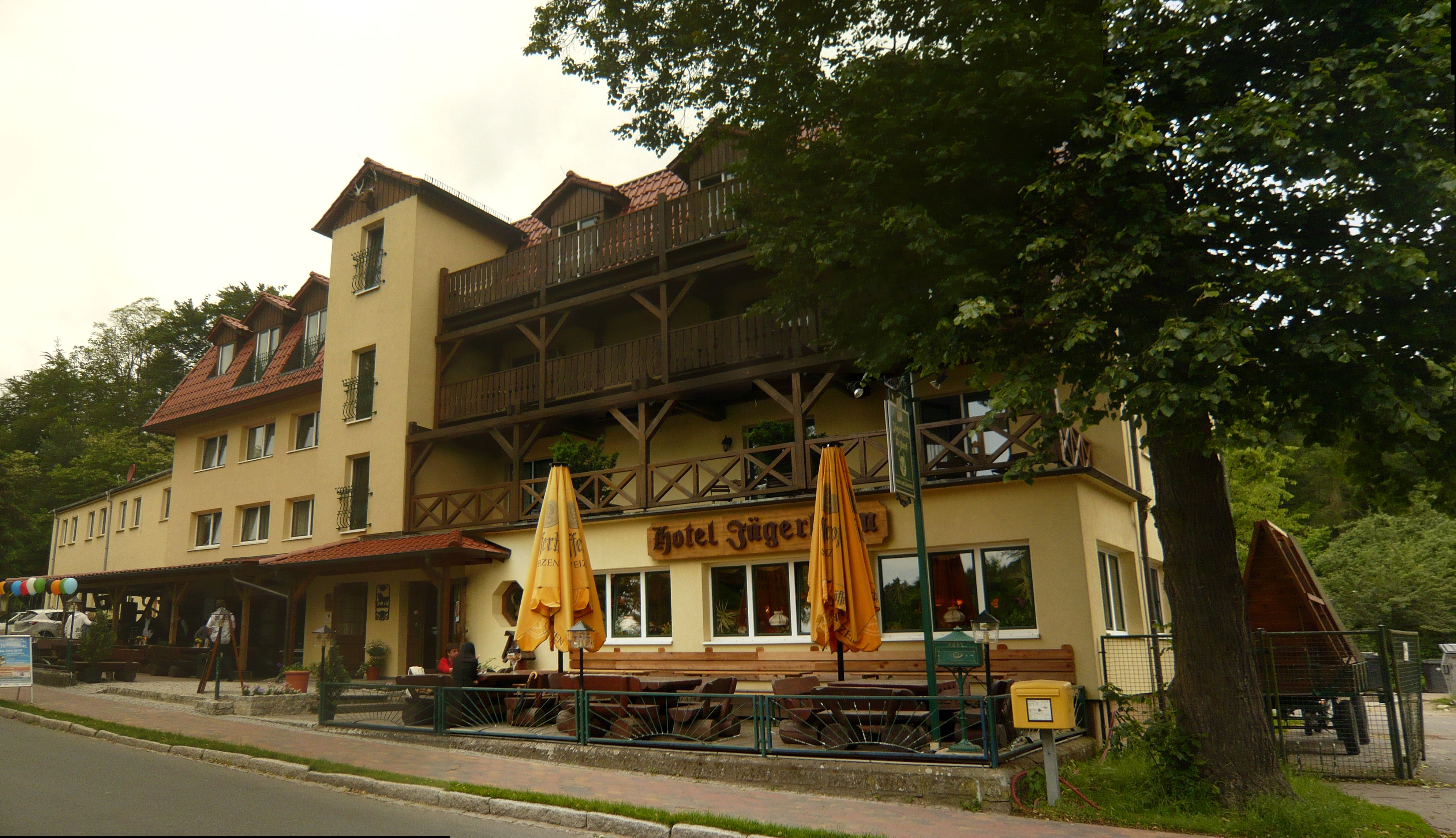 Wandlitz / Ützdorf: Hotel-Restaurant Jägerheim